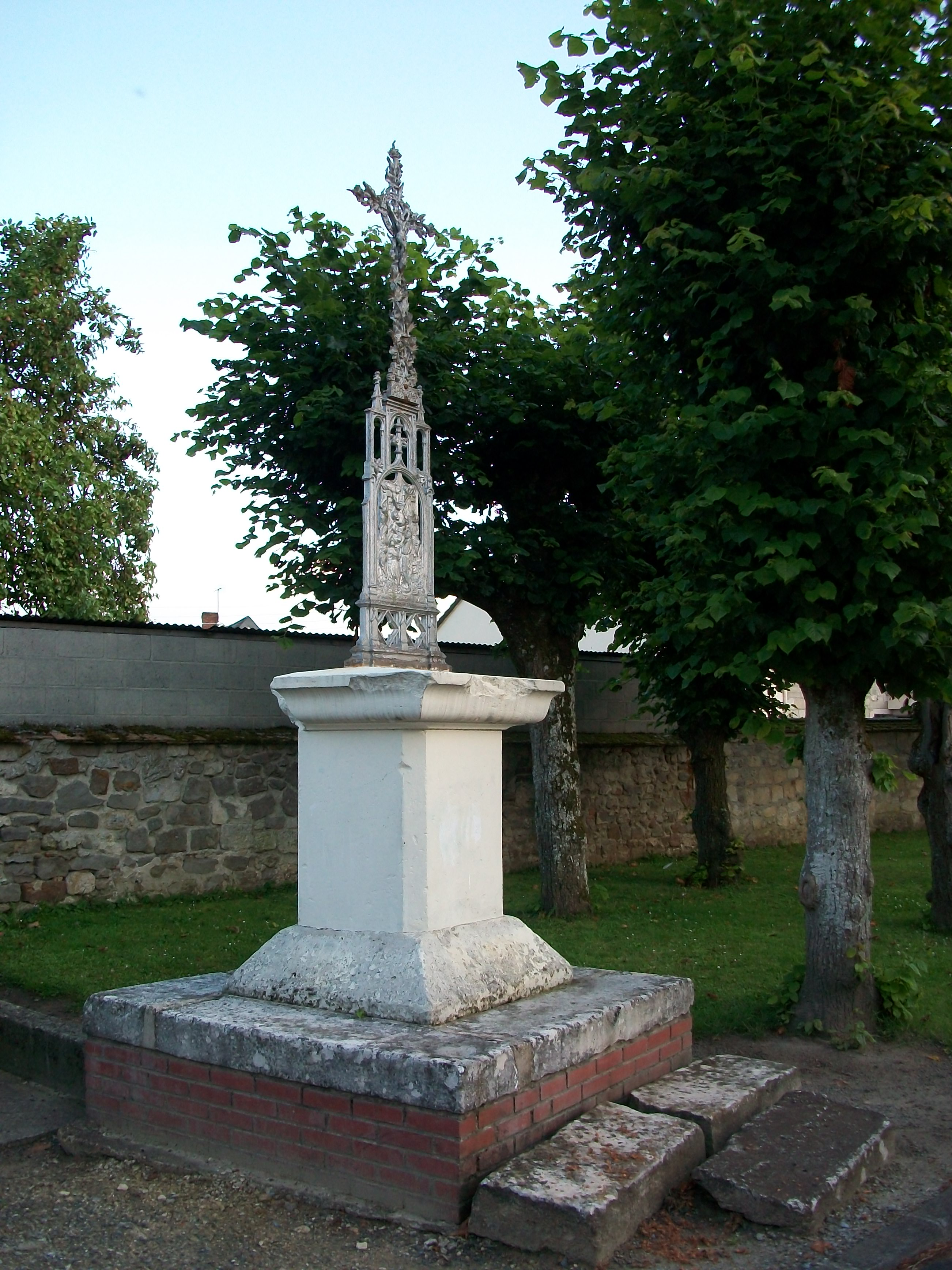 Vue du Calvaire de Chaillevois